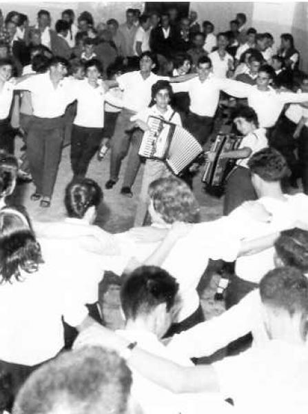 מהווי בקיבוץ